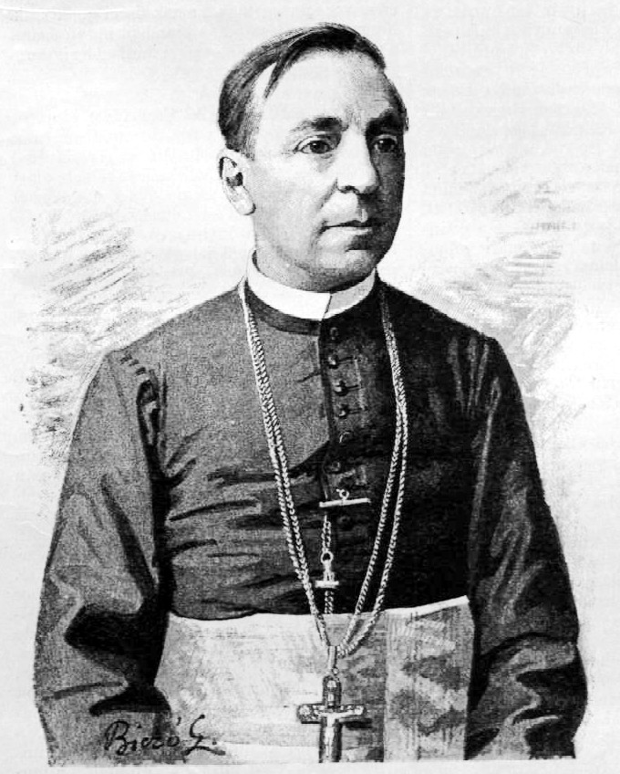 Dessewffy Sándor (1834–1907) csanádi püspök, a Felső Magyarországi Múzeum Egylet elnöke. Biczó Géza rajza